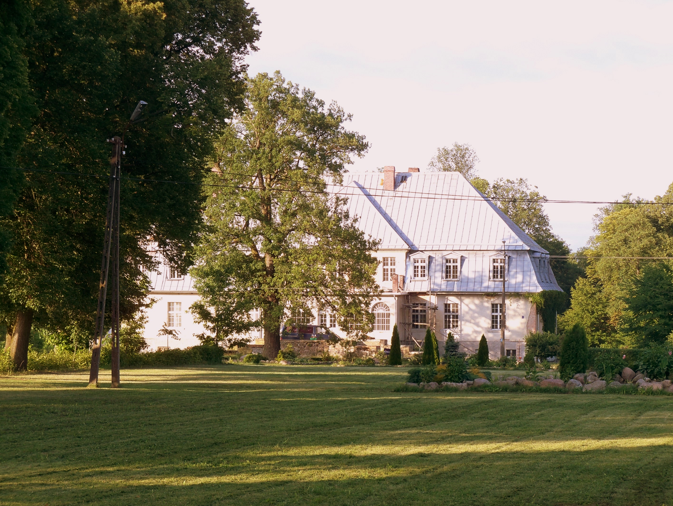 Pałac w Kikowie